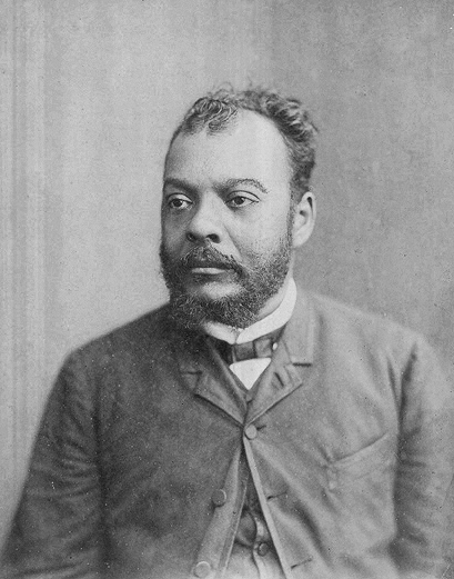 Escritor e abolicionista brasileiro José do Patrocínio (1854 - 1905).